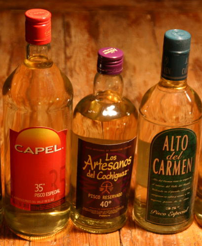 Botellas de piscos producidos por la empresa CAPEL.